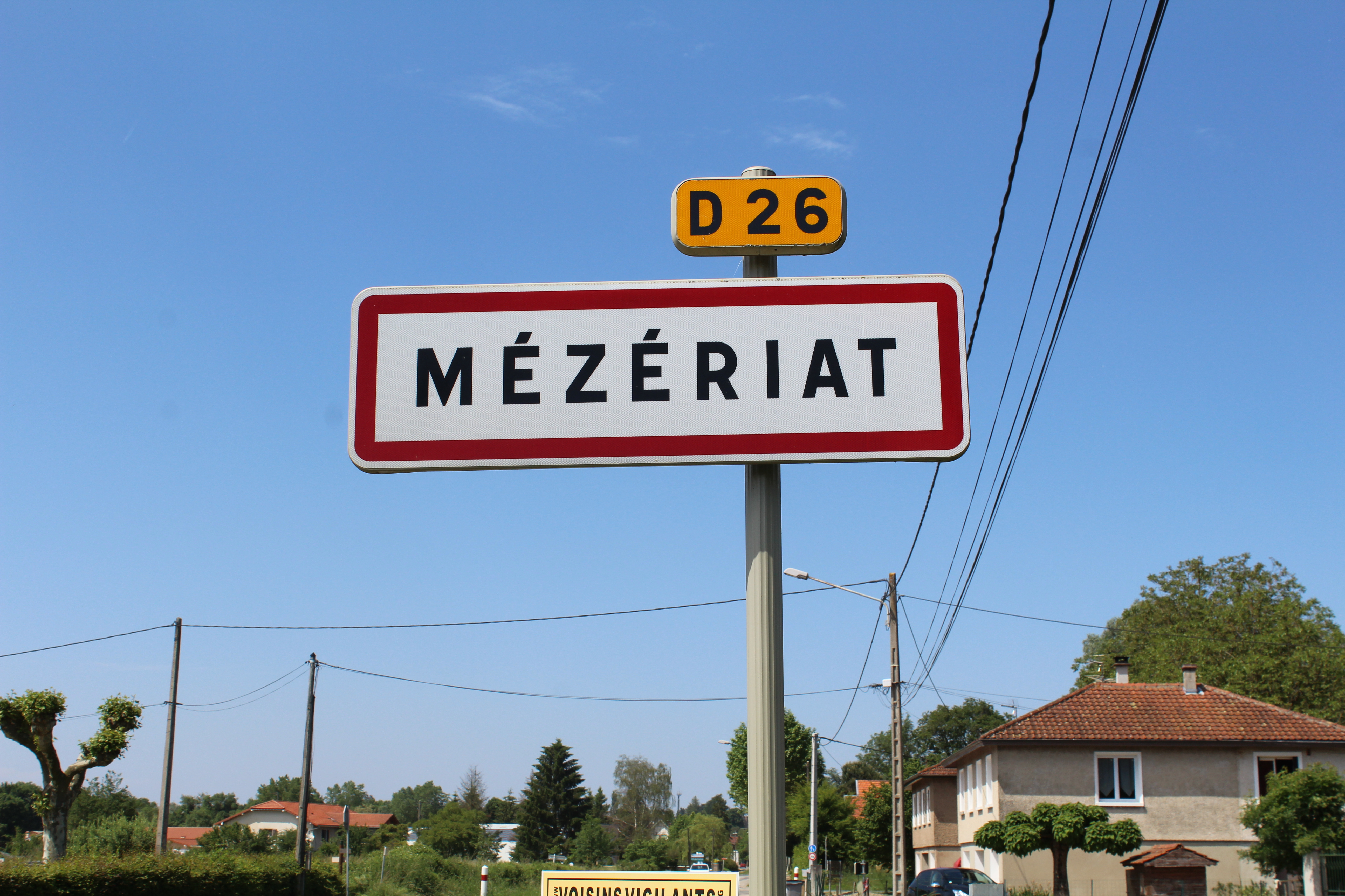 Panneau d'entrée d'agglomération de Mézériat.